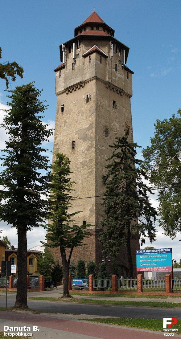 Wieża ciśnień w Międzyrzeczu, budynek murowany z cegły na planie kwadratu, nakryty dachem namiotowym. Wys. 50 m.